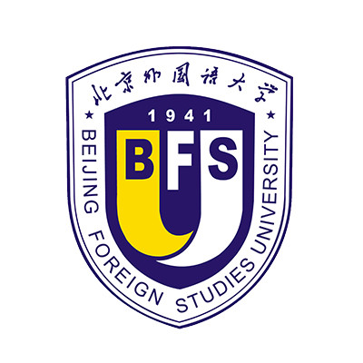 北京外国语大学(Beijing Foreign Studies University)LOGO